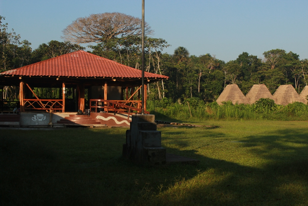 Instalaciones de Yasuni Kichwa Ecolodge